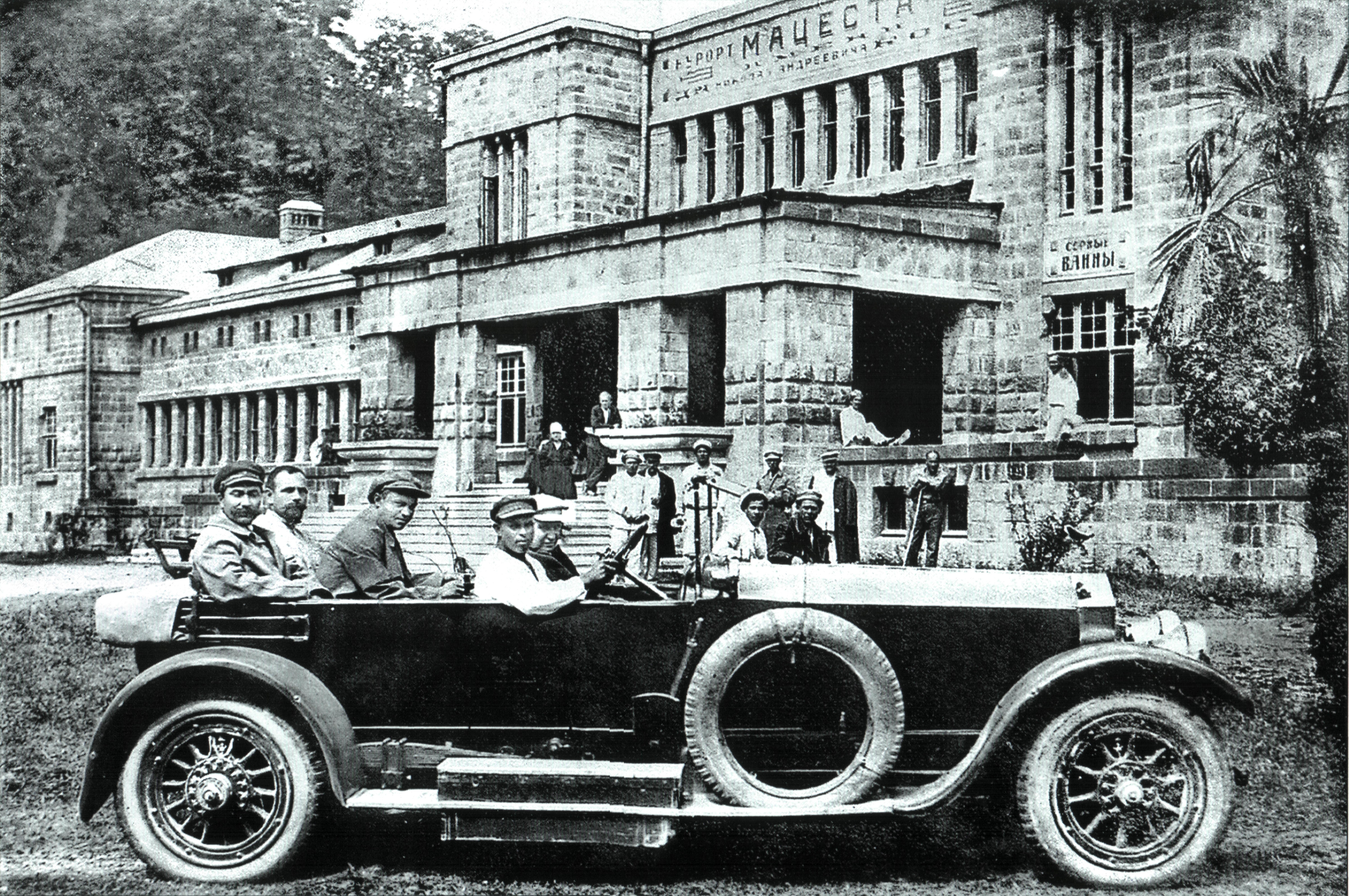 Офицеры